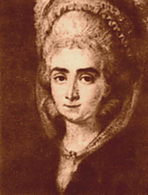 Магдалена Лаура Сирмен (Ломбардини)